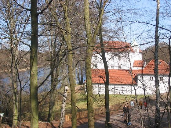 Grunewaldsee, Berlin (Jagdschloss Grunewald und See)